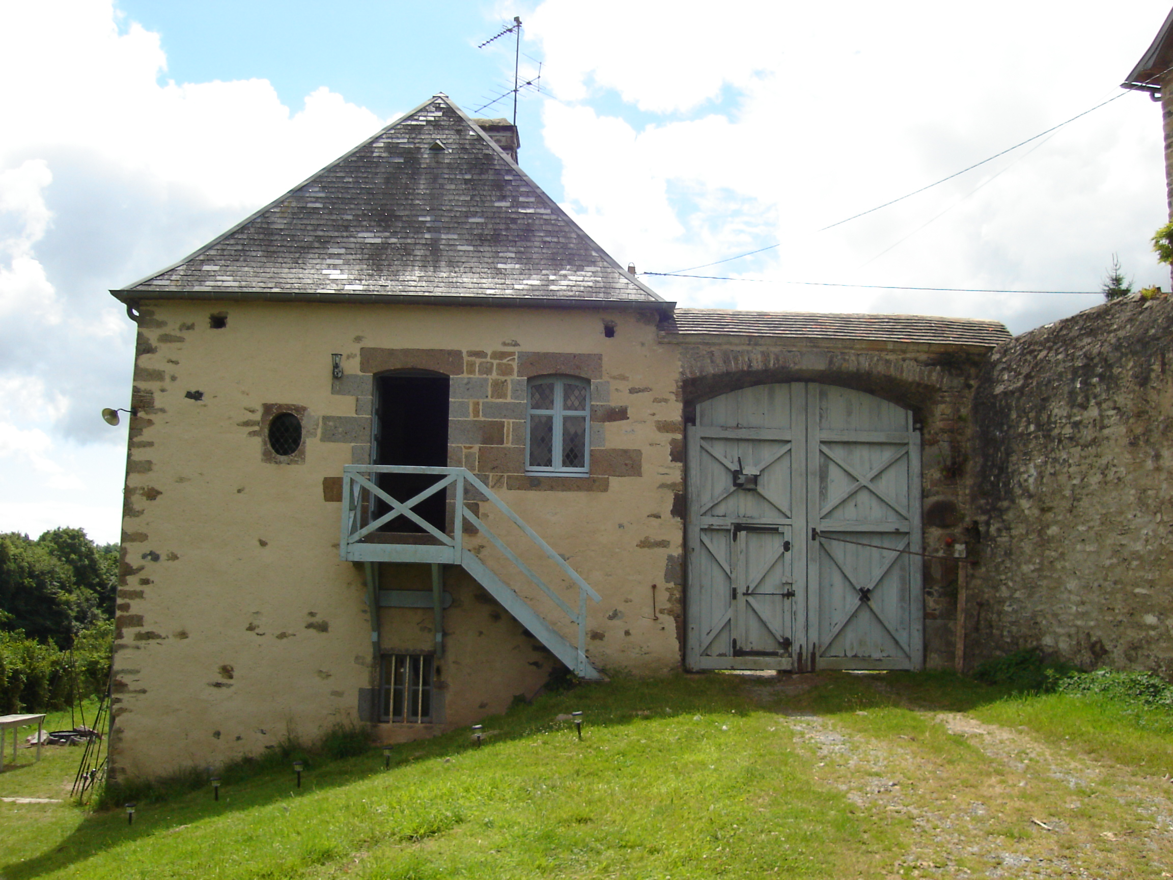 Photographie du pavillon de chasse du Parc médiéval de l'Évêque à Coutances.